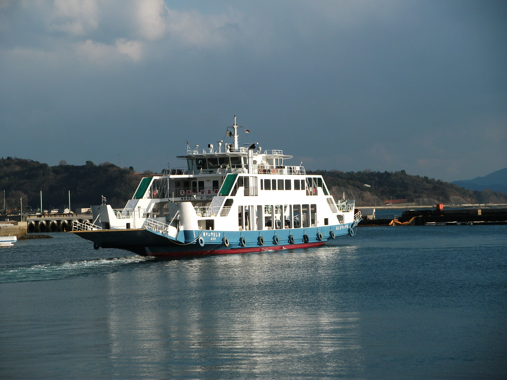 安芸津フェリー。広島県東広島市、安芸津港にて。